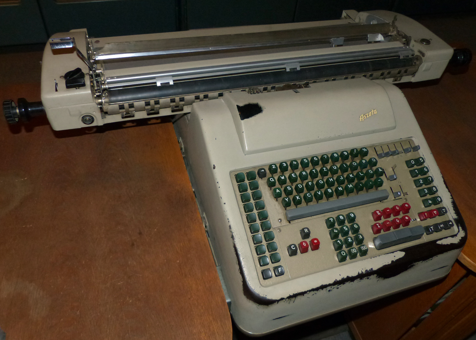 Buchungsmaschine Ascota, Klasse 170/15, um 1960, VEB Buchungsmaschinenwerk Karl-Marx-Stadt; Exponat in den Technischen Sammlungen Dresden